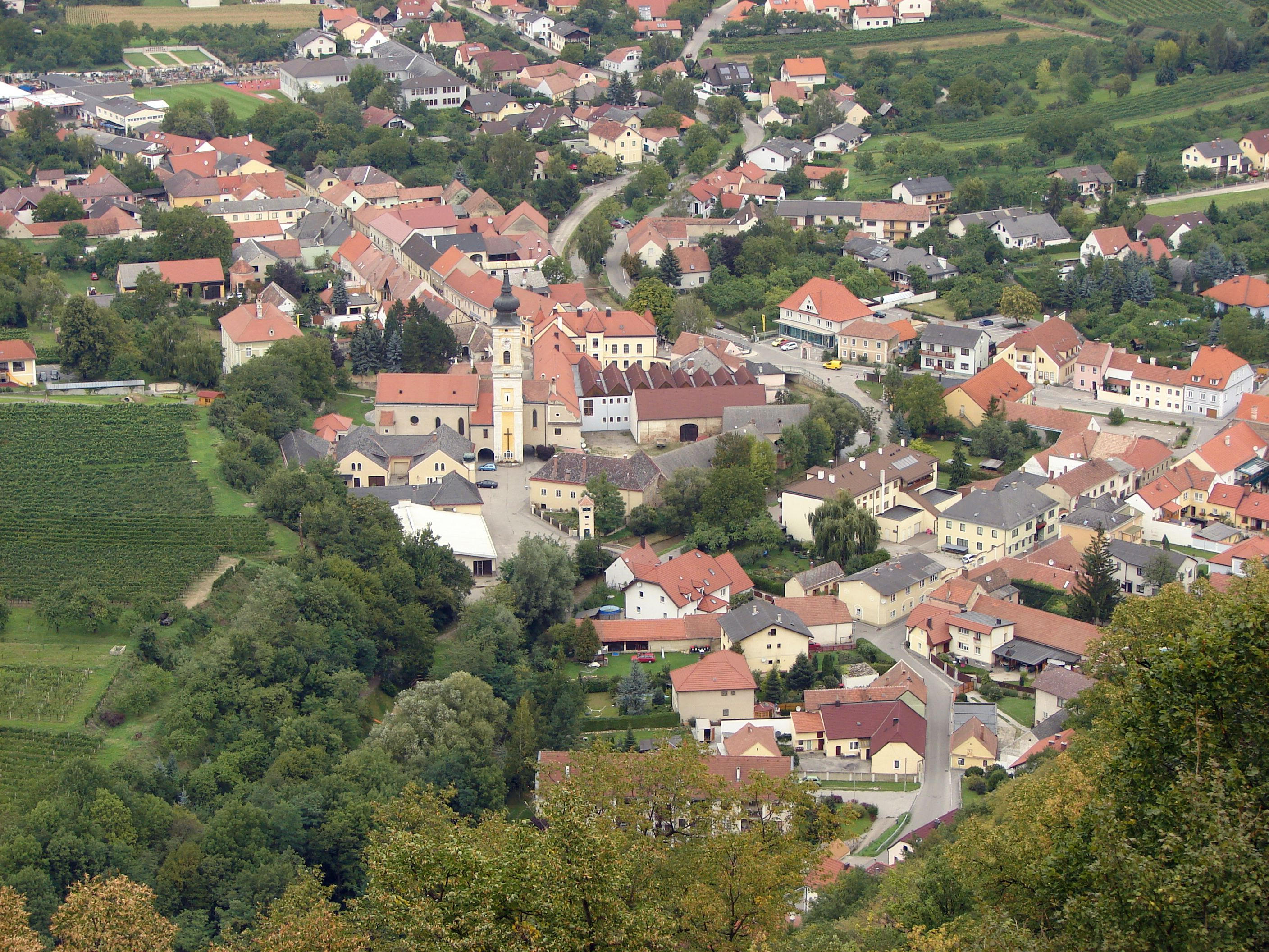 Furth bei Göttweig vom Stift Göttweig aus gesehen.